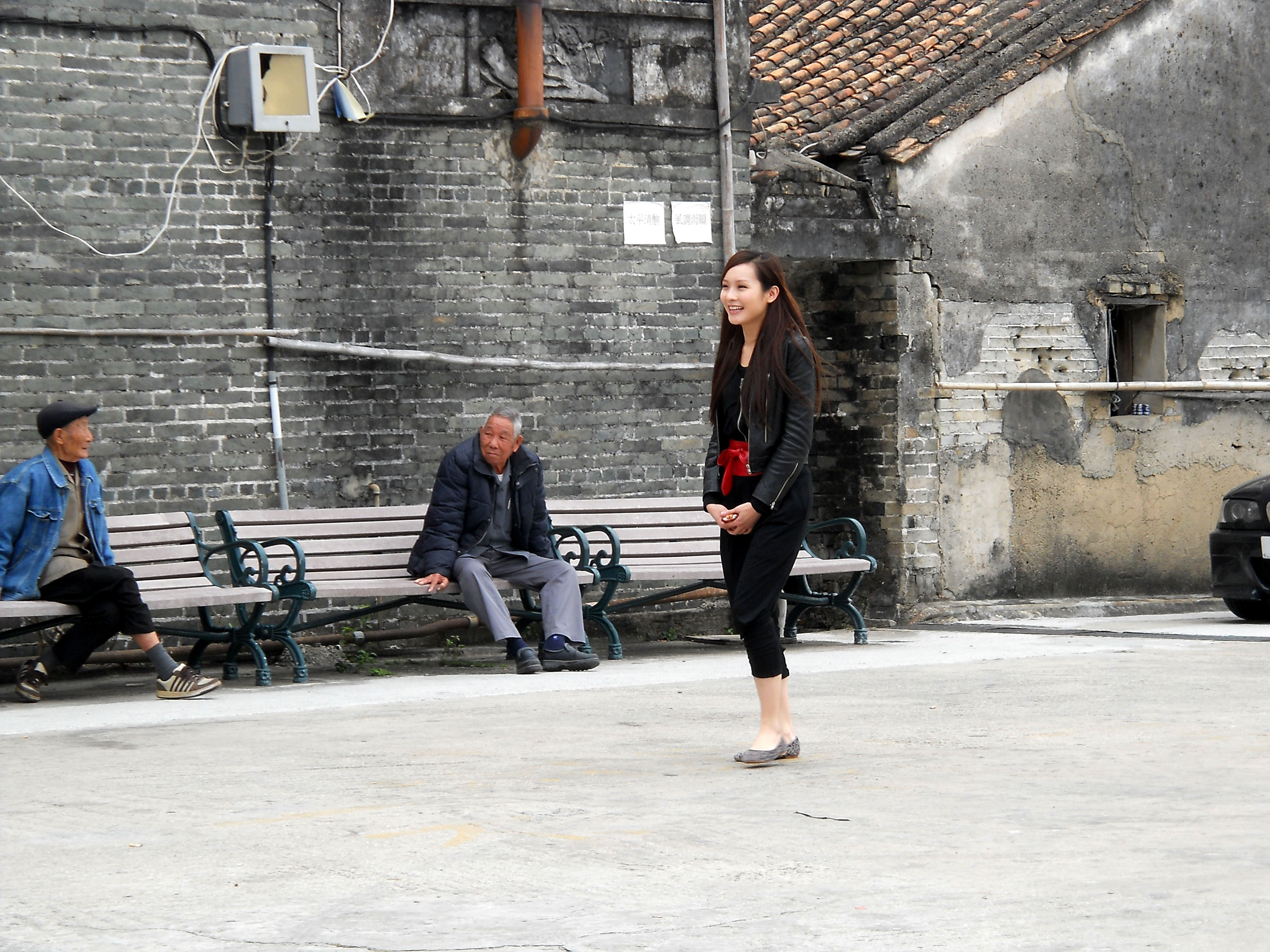 中文（香港）: 李嘉馨